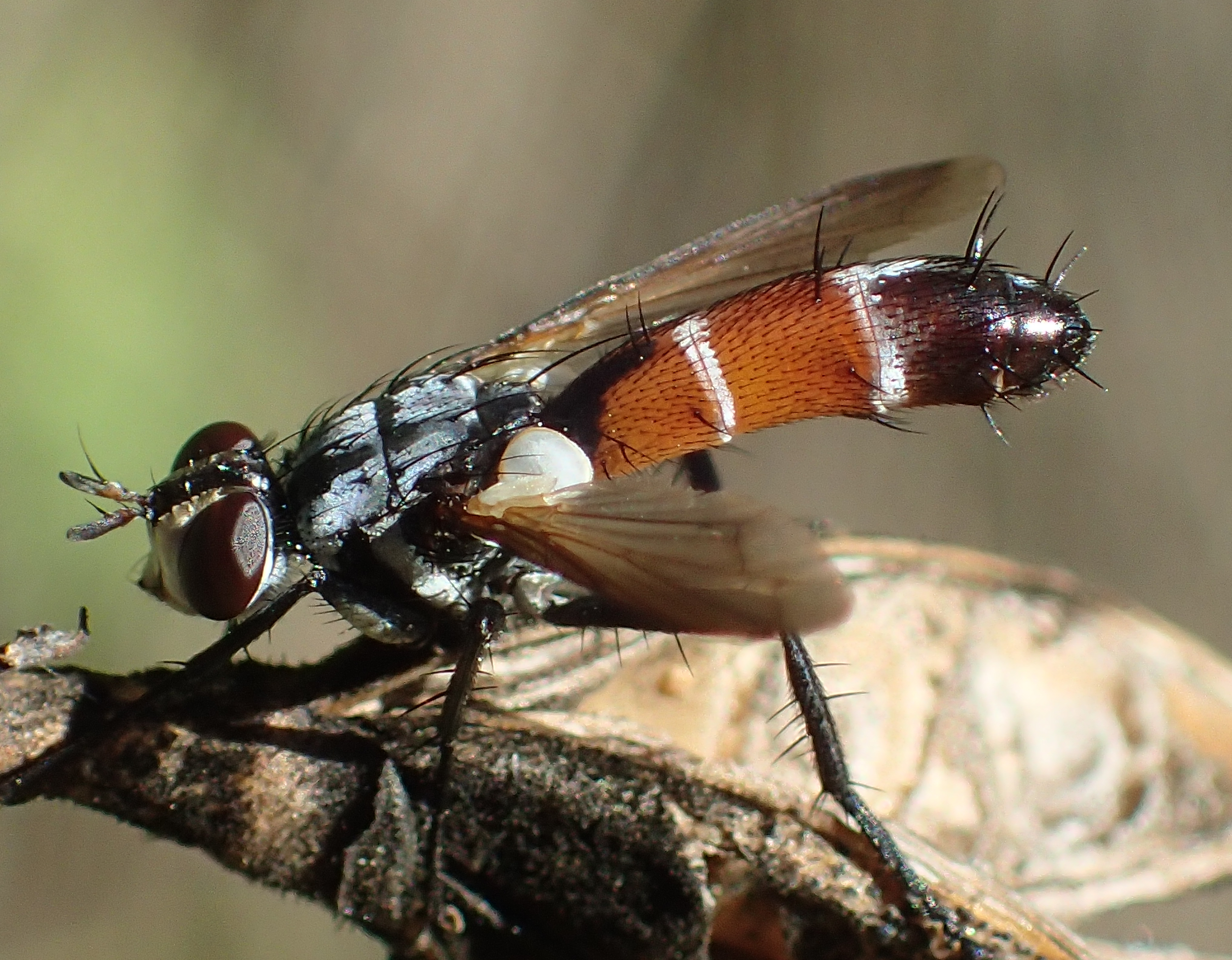 Cylindromyia, höchst wahrscheinlich Cylindromyia intermedia, aus Griechenland, Peloponnes, Helmos-Gebirge bei Polydroso